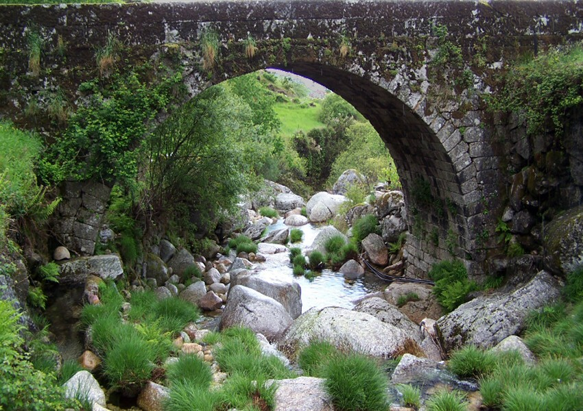 Ponte Romana